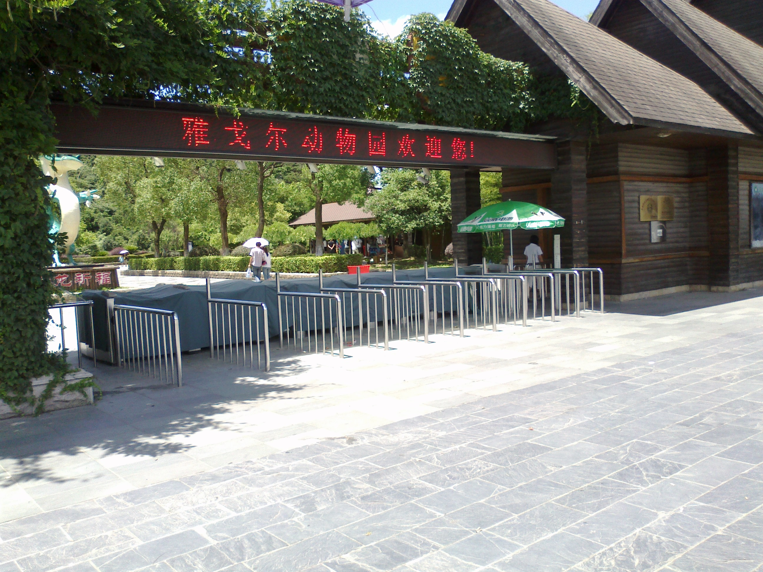 中文（中国大陆）: 宁波雅戈尔动物园正门